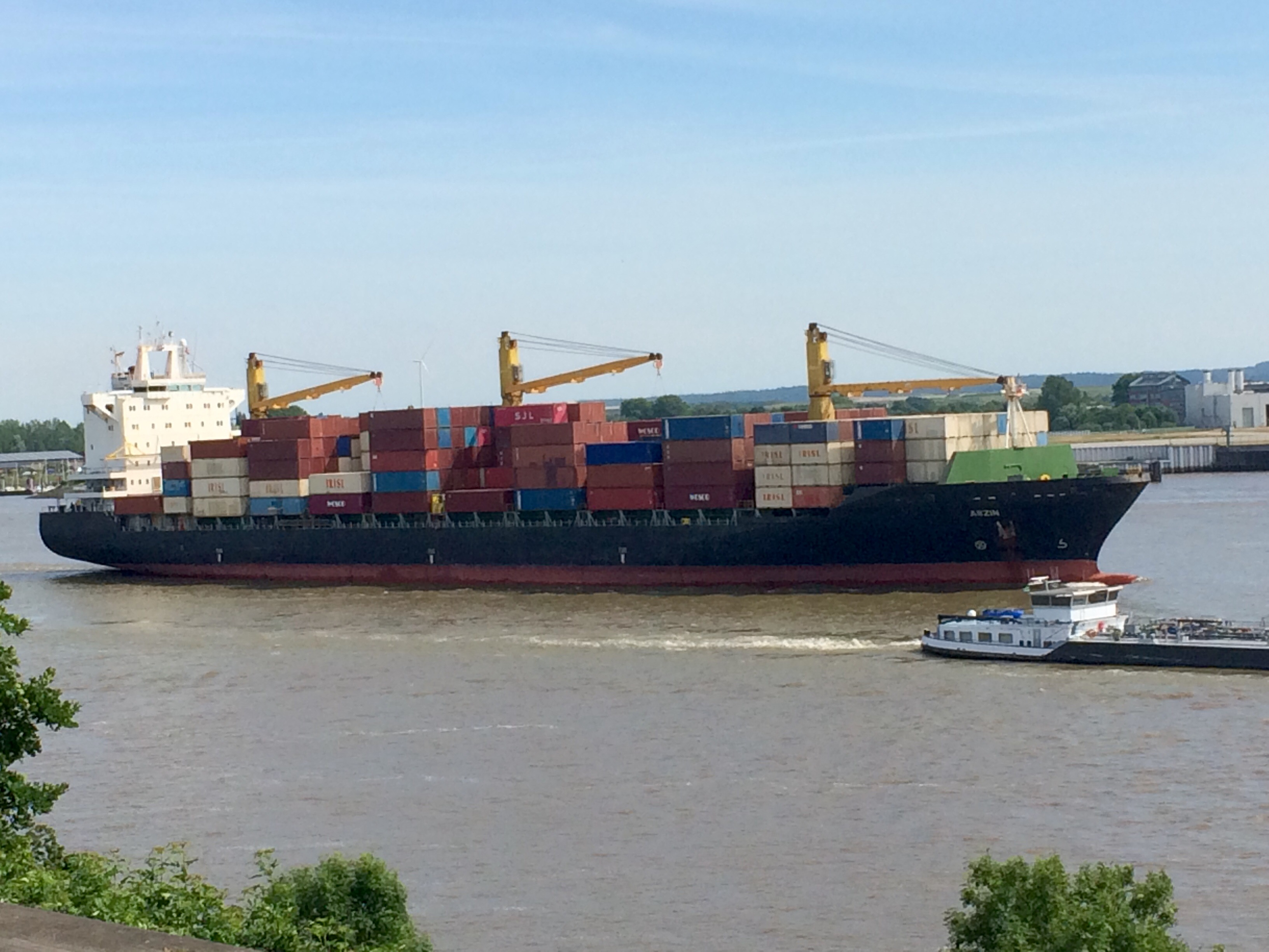 Container ship in the River Elbe in Hamburg